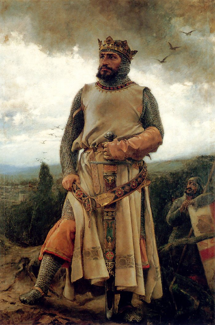 Retrato imaginario del rey Alfonso I de Aragón († 1134), que fue hijo del rey Sancho Ramírez y de la reina Felicia de Roucy.